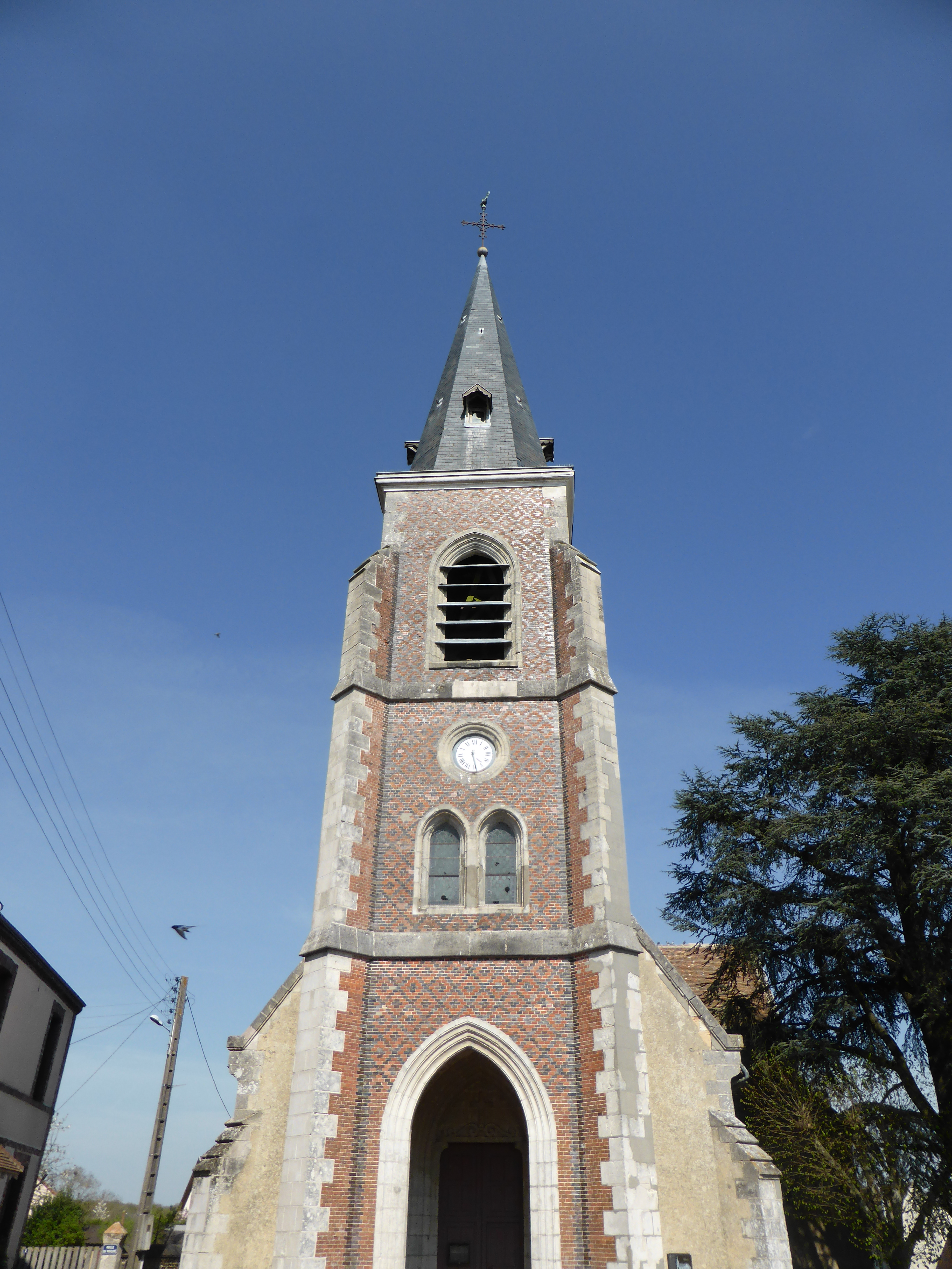 Clocher en briques de l'église Saint-Sauveur de Champrond-en-Gâtine, en Eure-et-Loir.